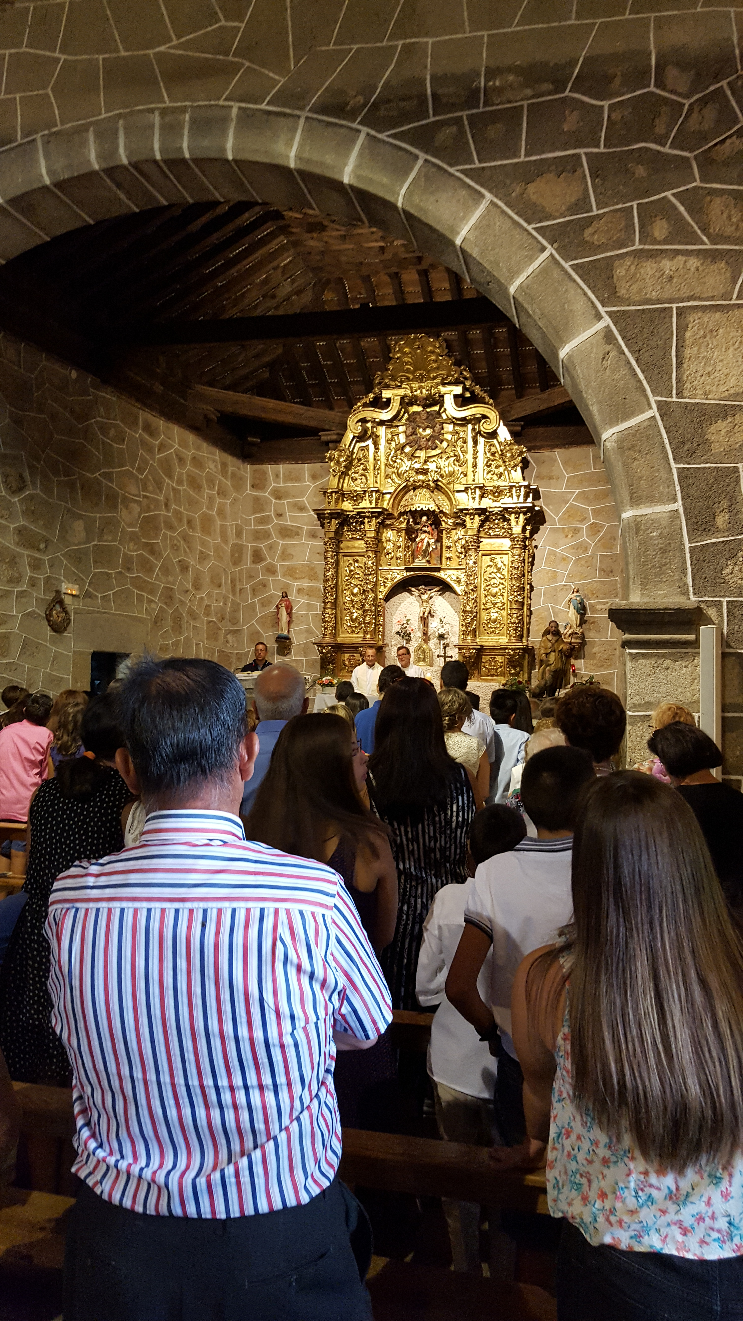 Misa de San Roque, La Torre Ávila , España